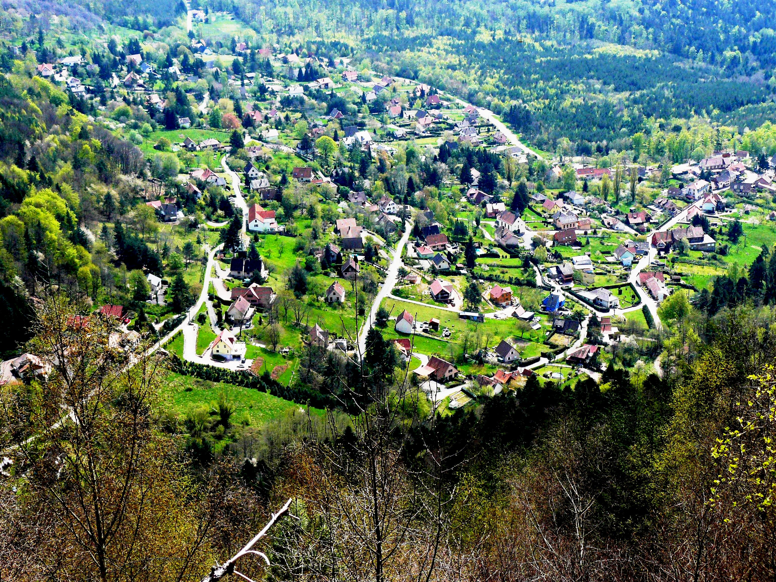 Le village de La Vancelle vu depuis les roches du Haut de La Vancelle